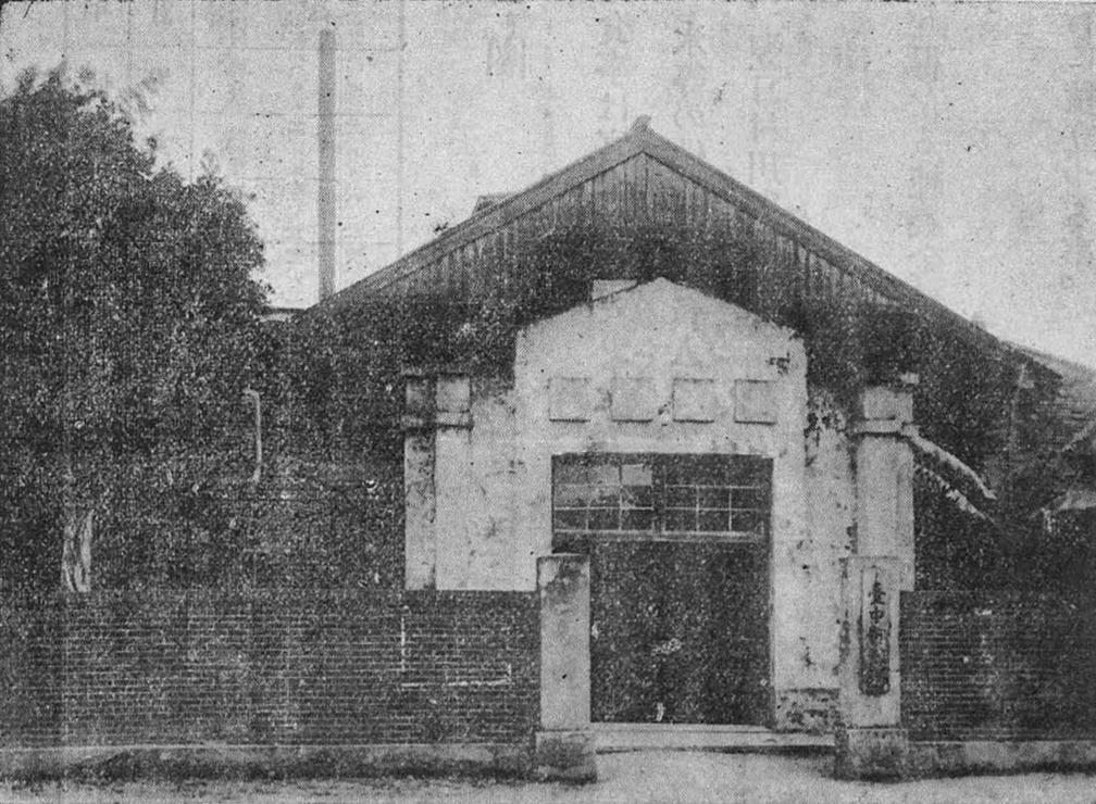 臺中市公共浴場設立於1923年，位於台中市敷島町1丁目